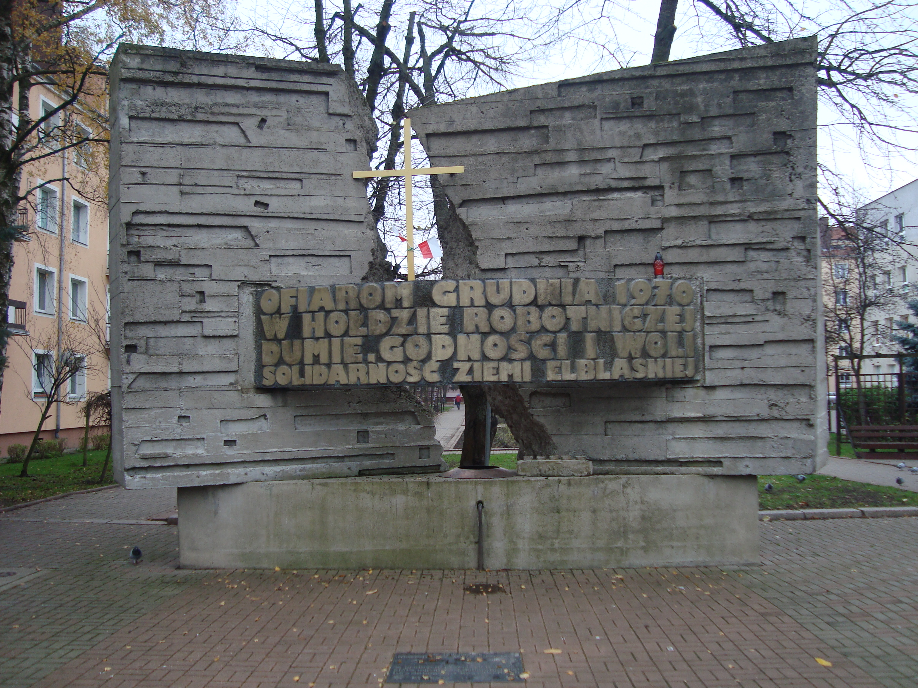 Pomnik Ofiar Grudnia 1970 w Elblągu na pl. Solidarności